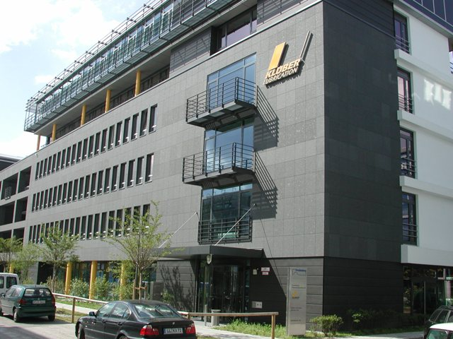 Außenaufnahme des Technologie-Zentrums in der Geisenhausenerstr. 7 in München